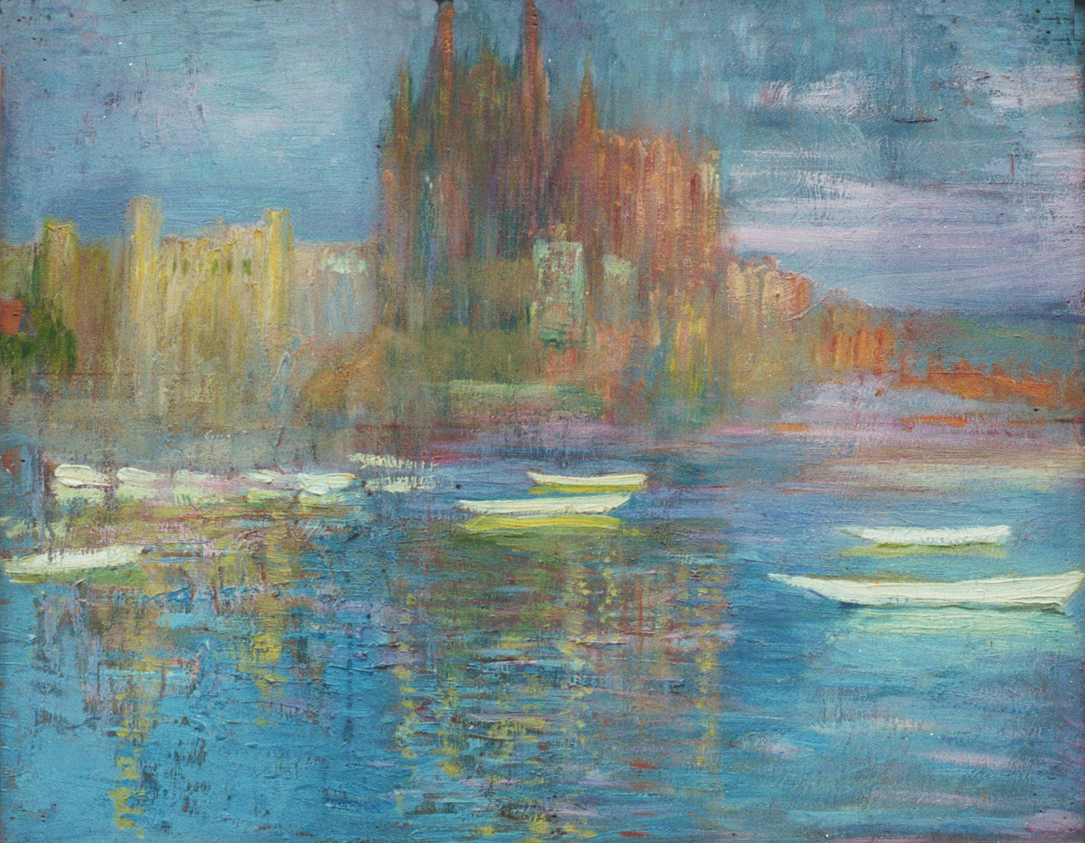 Pilar Montaner Maturana (1912). La Catedral de Palma de Mallorca